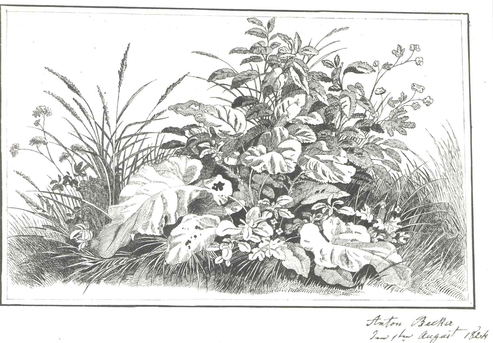 Pflanzenbild